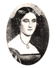 Retrato de Trinidad Guevara, actriz (1798 - 1873)